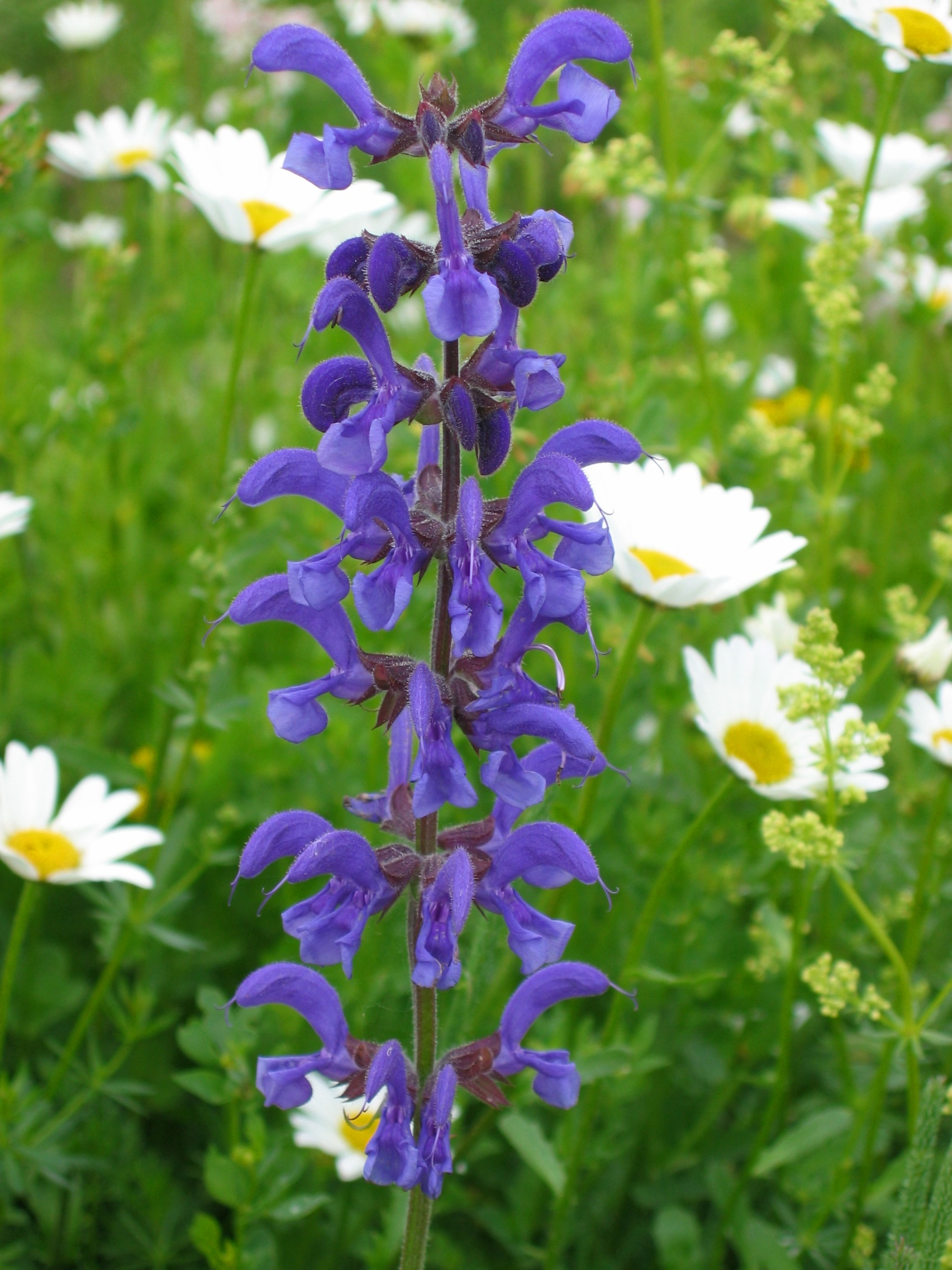 Wiesensalbei Salvia pratensis